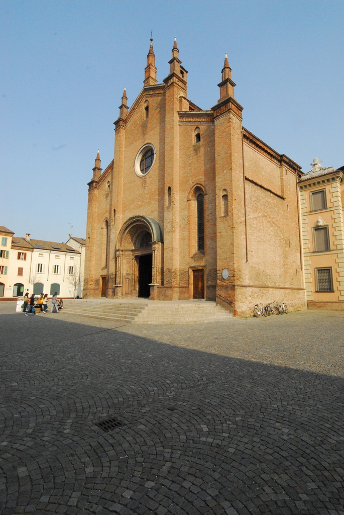 Vista della Collegiata di San Fiorenzo